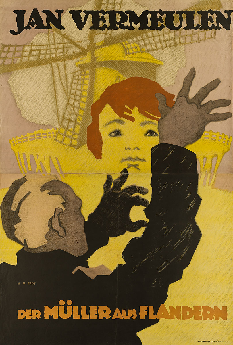 Plakat zum Stummfilm "Jan Vermeulen, der Müller aus Flandern", gestaltet von Hans Rudi Erdt (1883–1925), 1917, Museum für Kunst und Gewerbe Hamburg, Inv.nr. EP2018.44